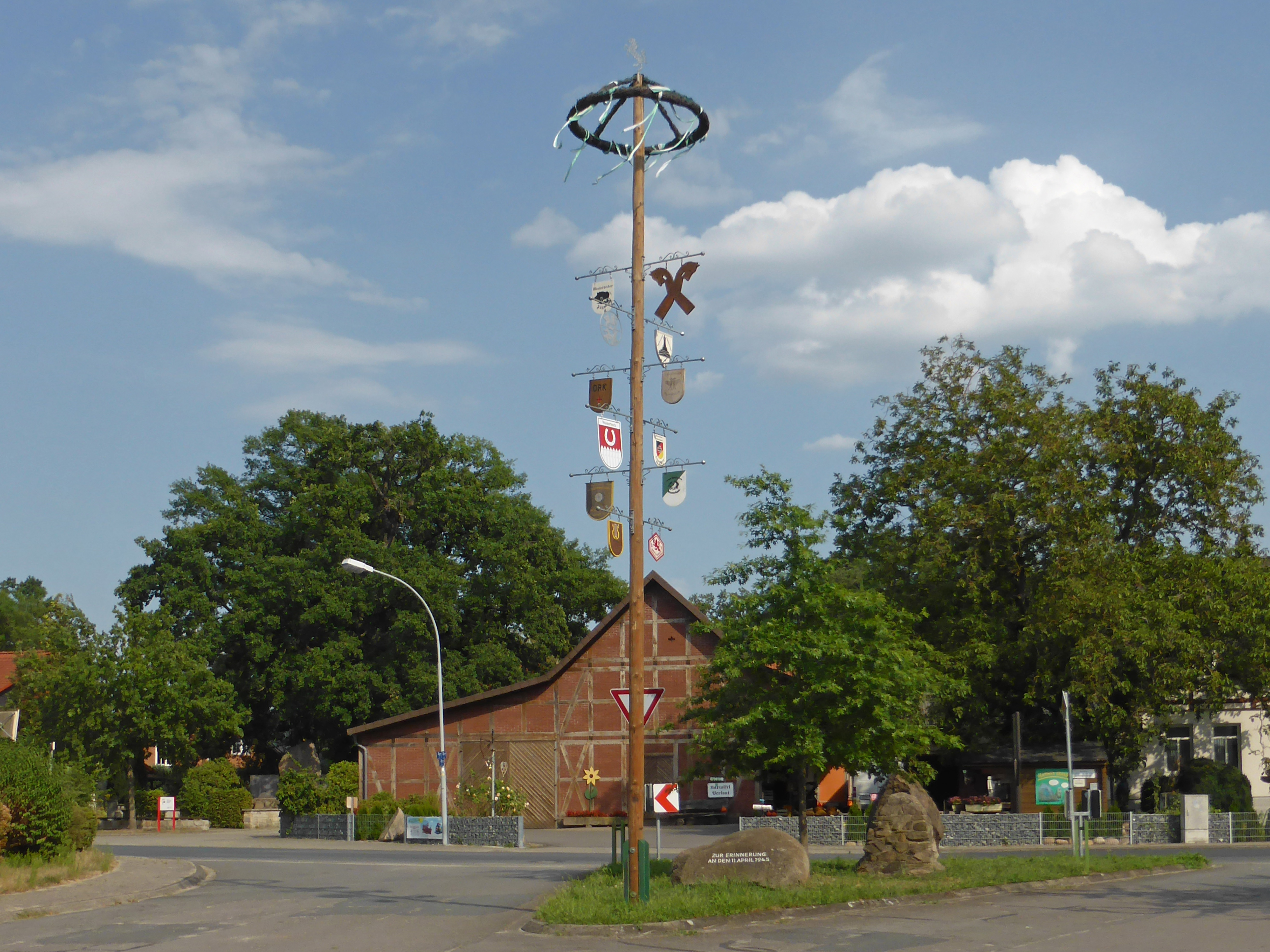 Maibaum und Gedenksteine in Westerbeck.